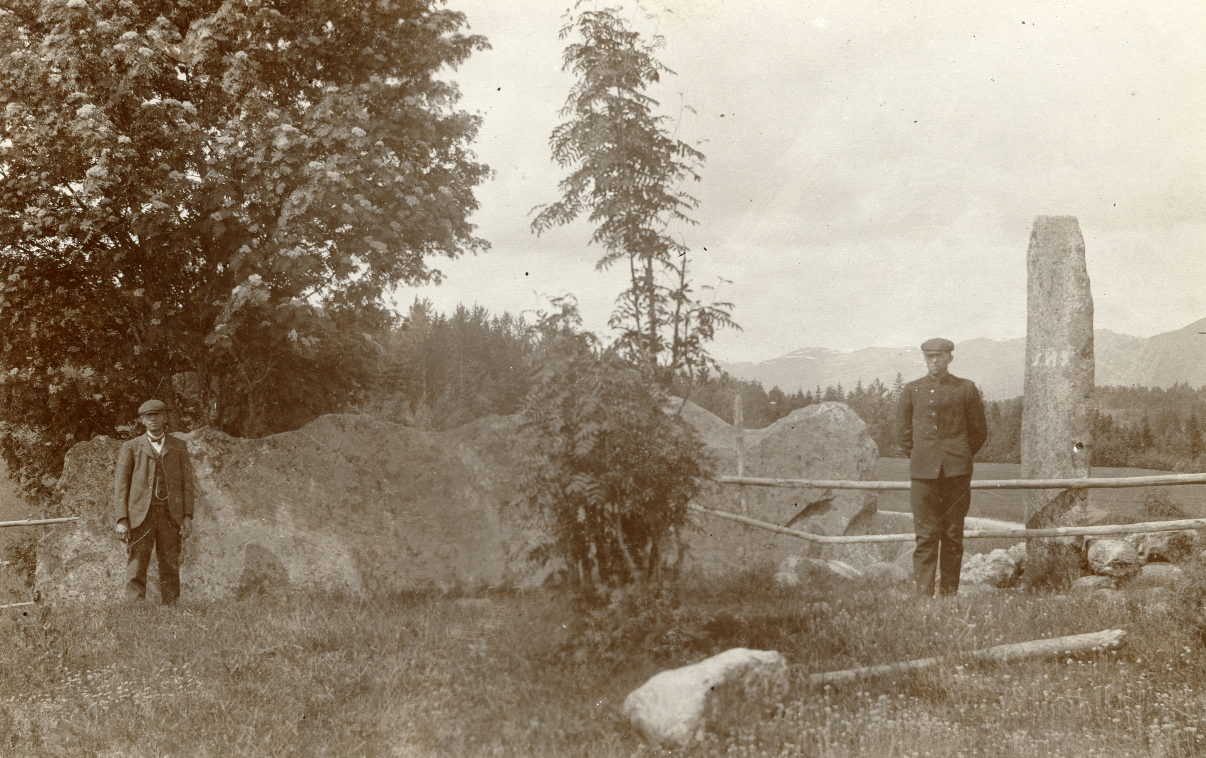 Gårå Kirkeruin i Bø, Telemark, Telemark Tomten til Stavkirken.